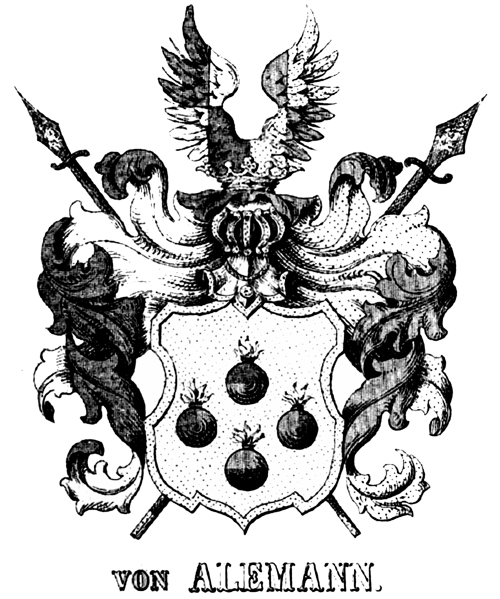 Coat of Arms Alemann (from Ravensberg)